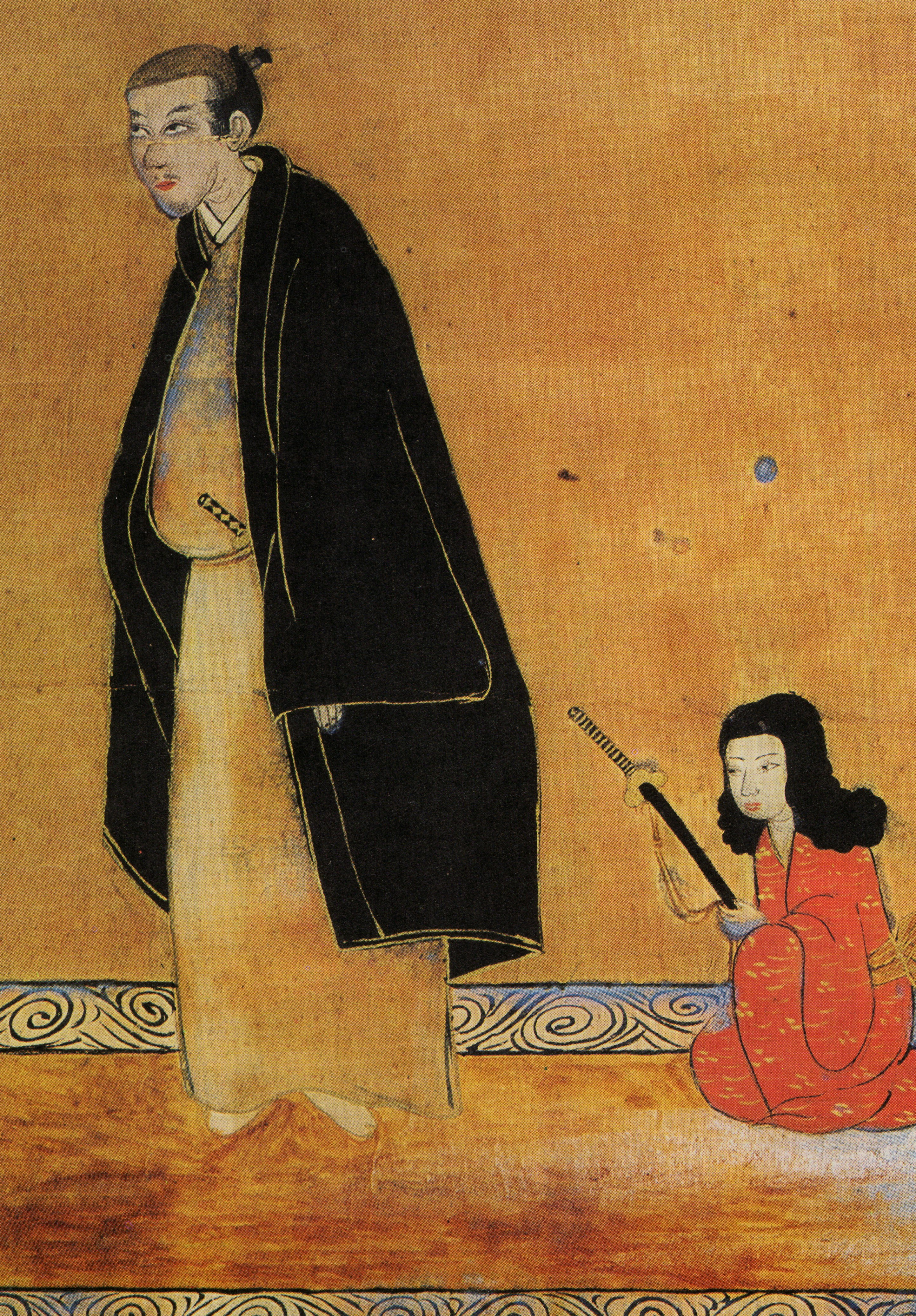 大村純信の肖像。